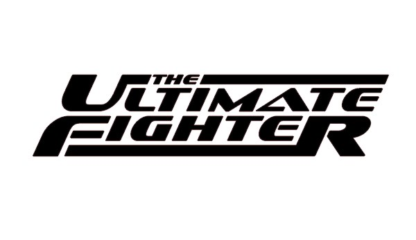 логотип реалити-шоу The Ultimate Fighter